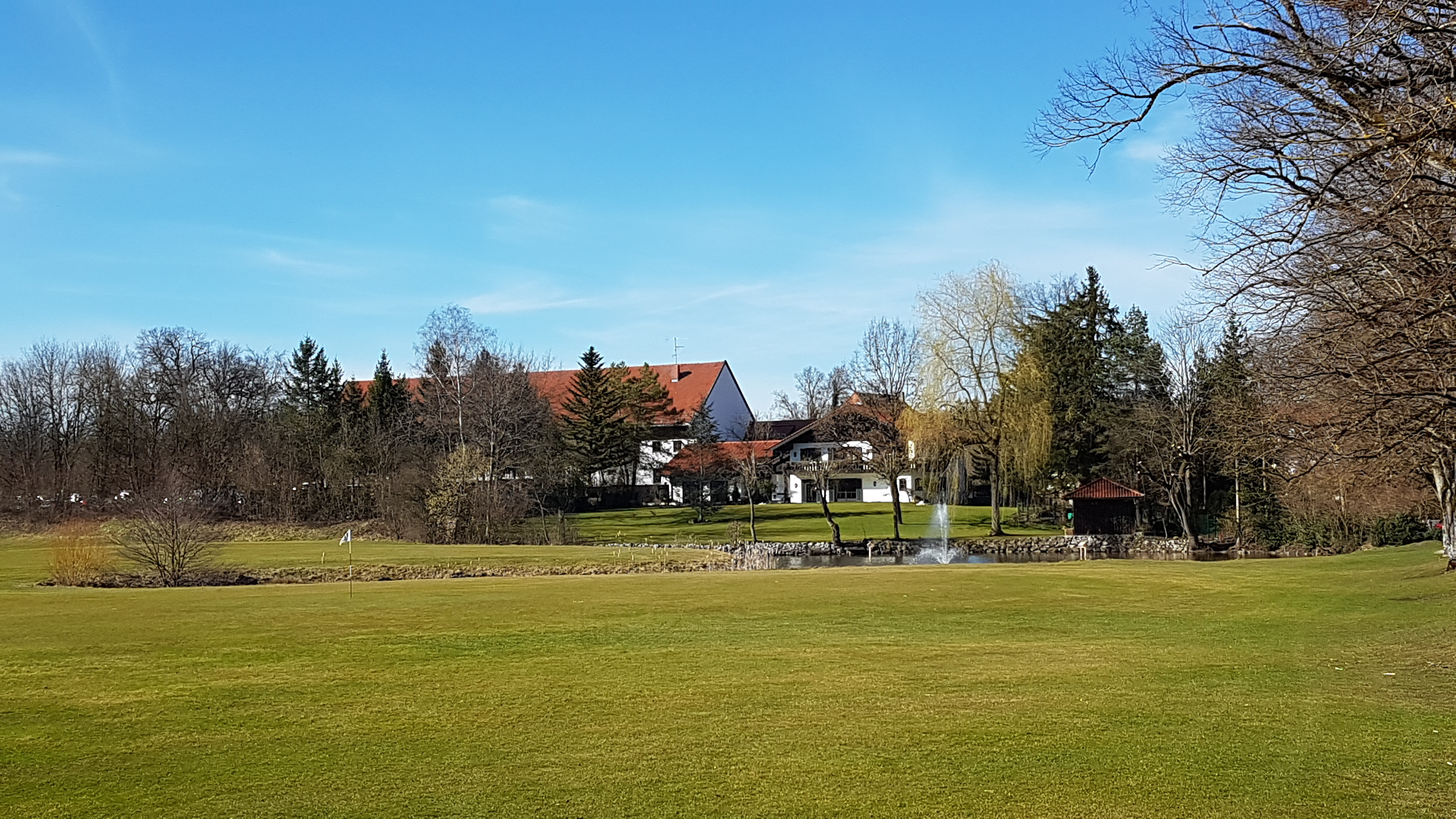 Riedhof (Egling), Gutshof der als Golfclub fungiert